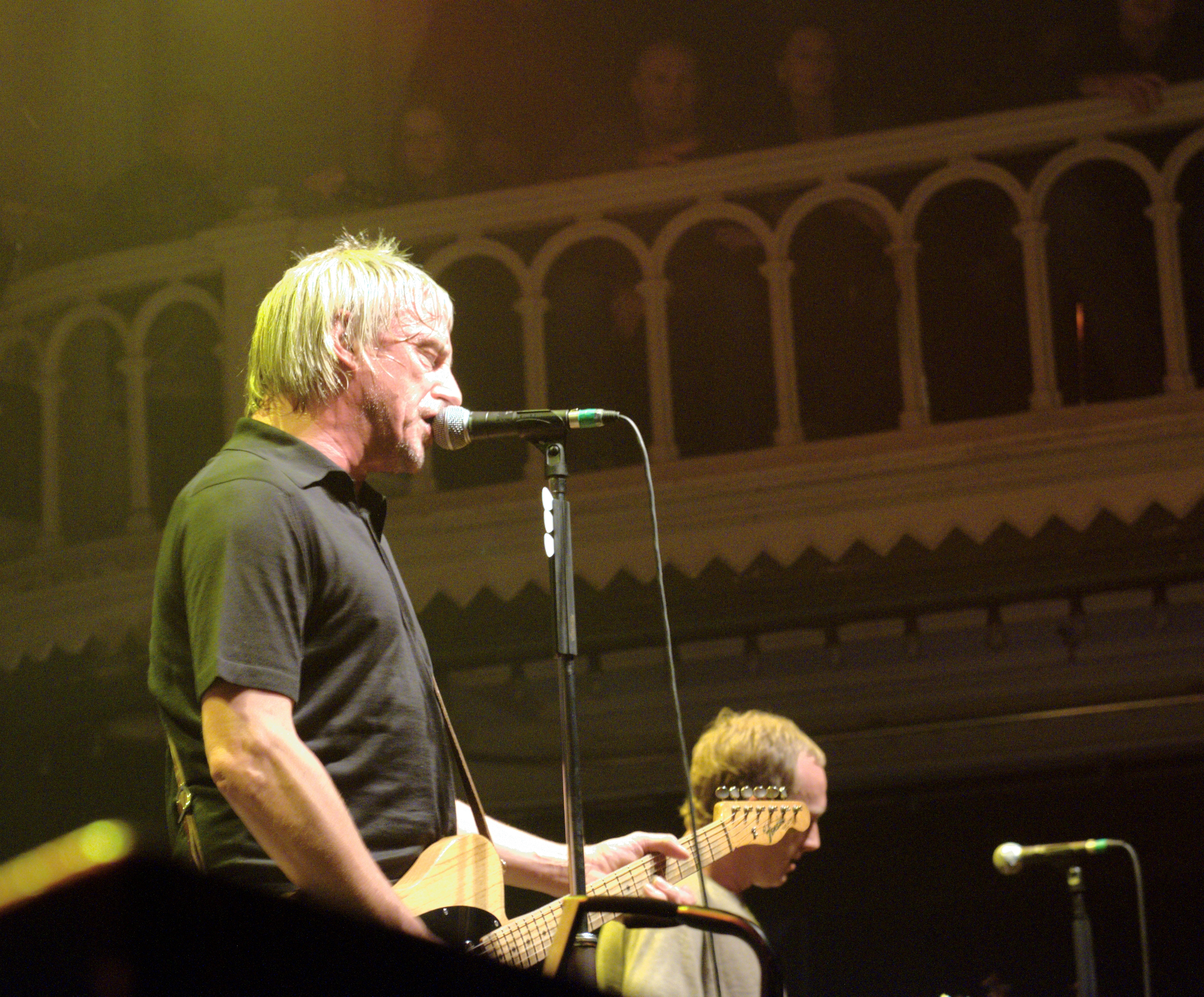 Concert de Paul Weller le 4/09/08 au Paradiso à Amsterdam